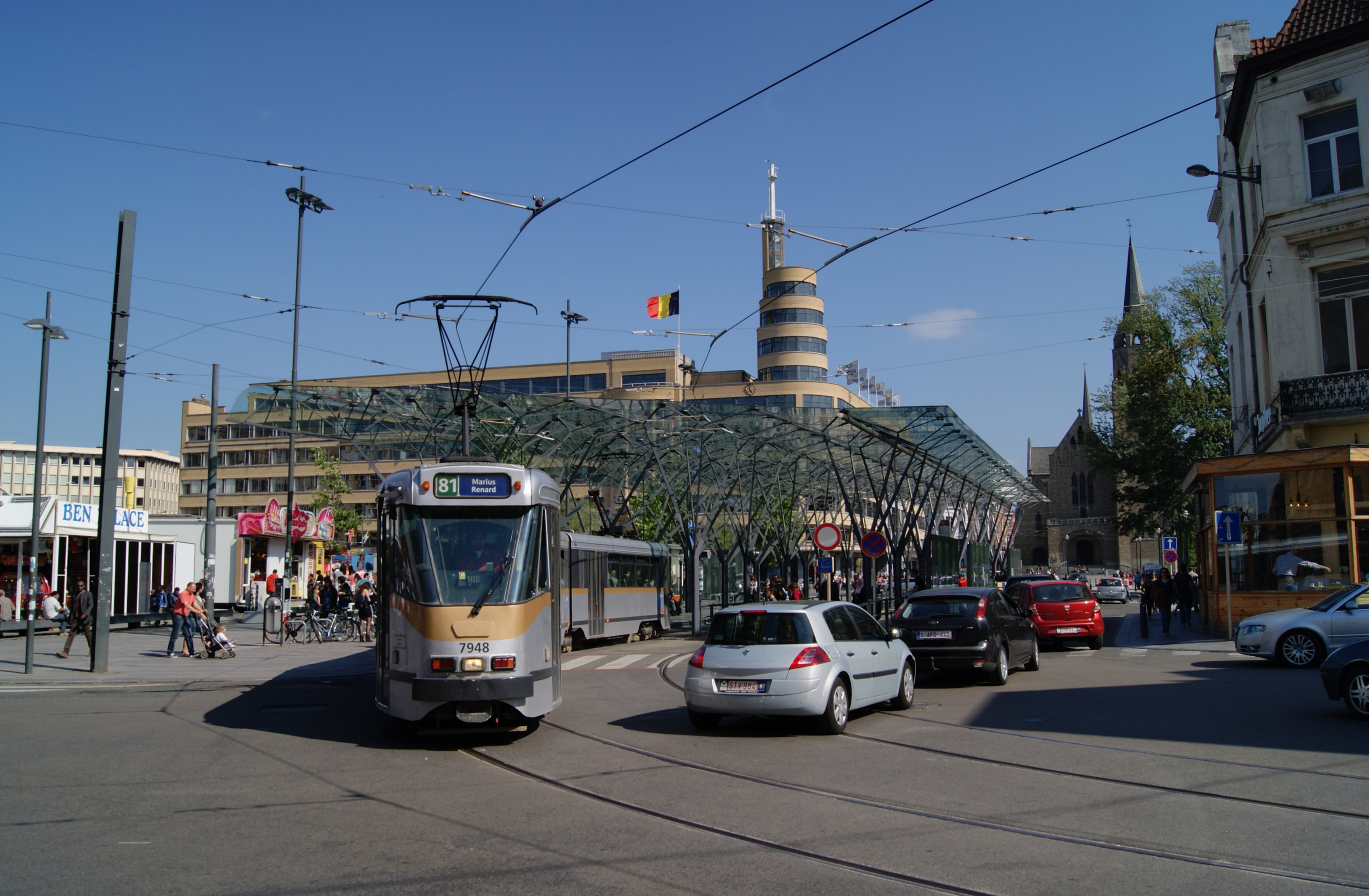 Ancien Insititut National de Radiodiffusion (I.N.R.) ligger i anslutning till torget Place Eugene Flagey i Ixelles, Bryssel, Beligen. Byggnaden uppfördes åren 1933-1938 av Joseph Diongre. Stilen är modernistisk / Art Déco. På bilden syns även den spårvagnsstation som ligger bredvid torget.